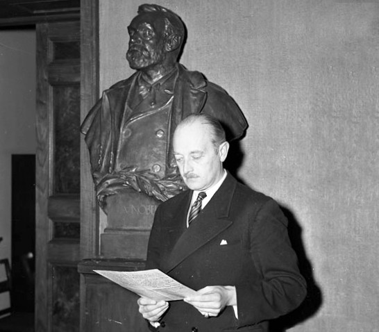 Sturegatan 14, i Nobelstiftelsens hus. Porträtt av en man vid Alfred Nobels byst. Troligtvis Nobelstiftelsens direktör Nils Ståhle